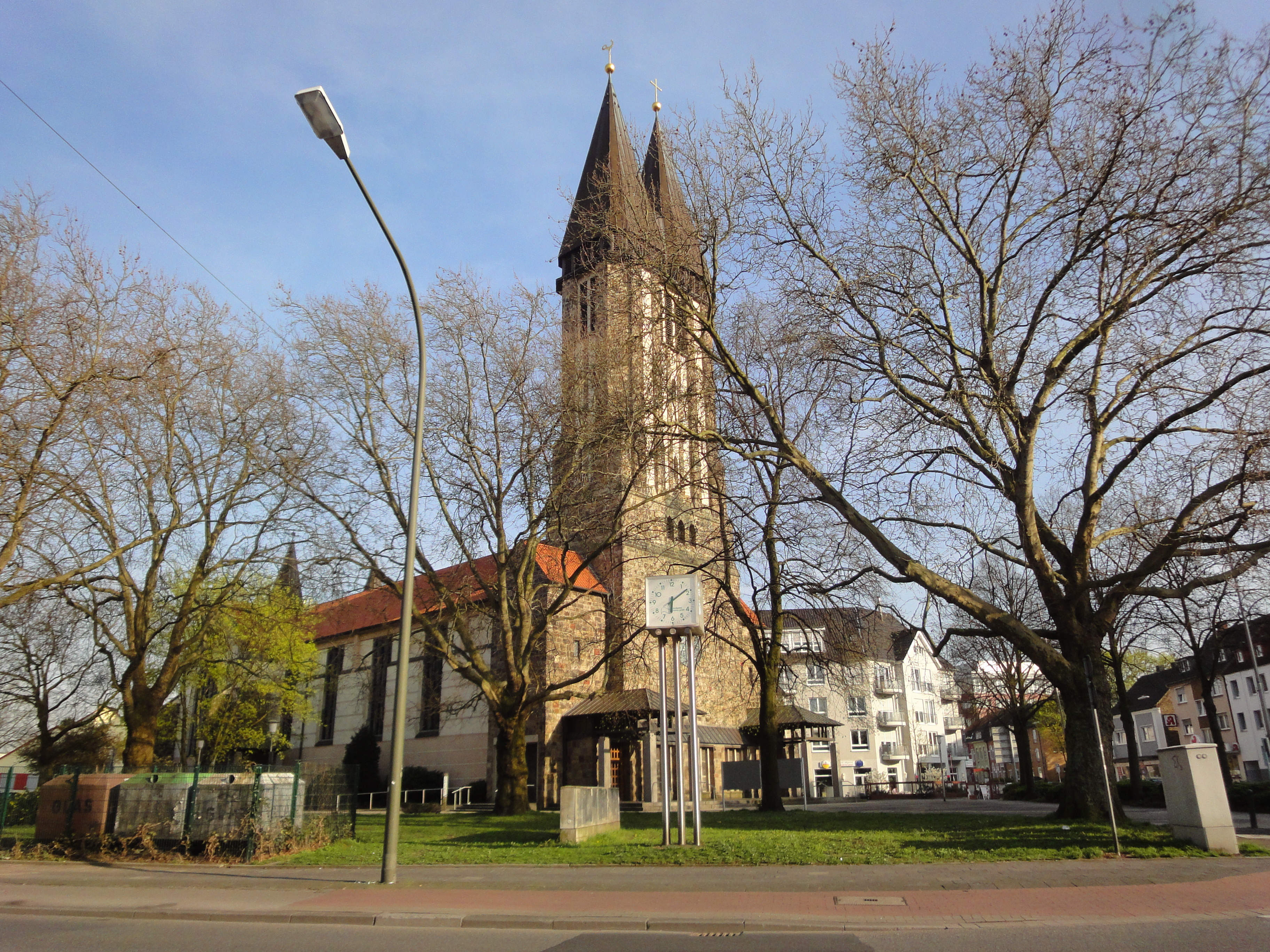 Liebfrauenkirche